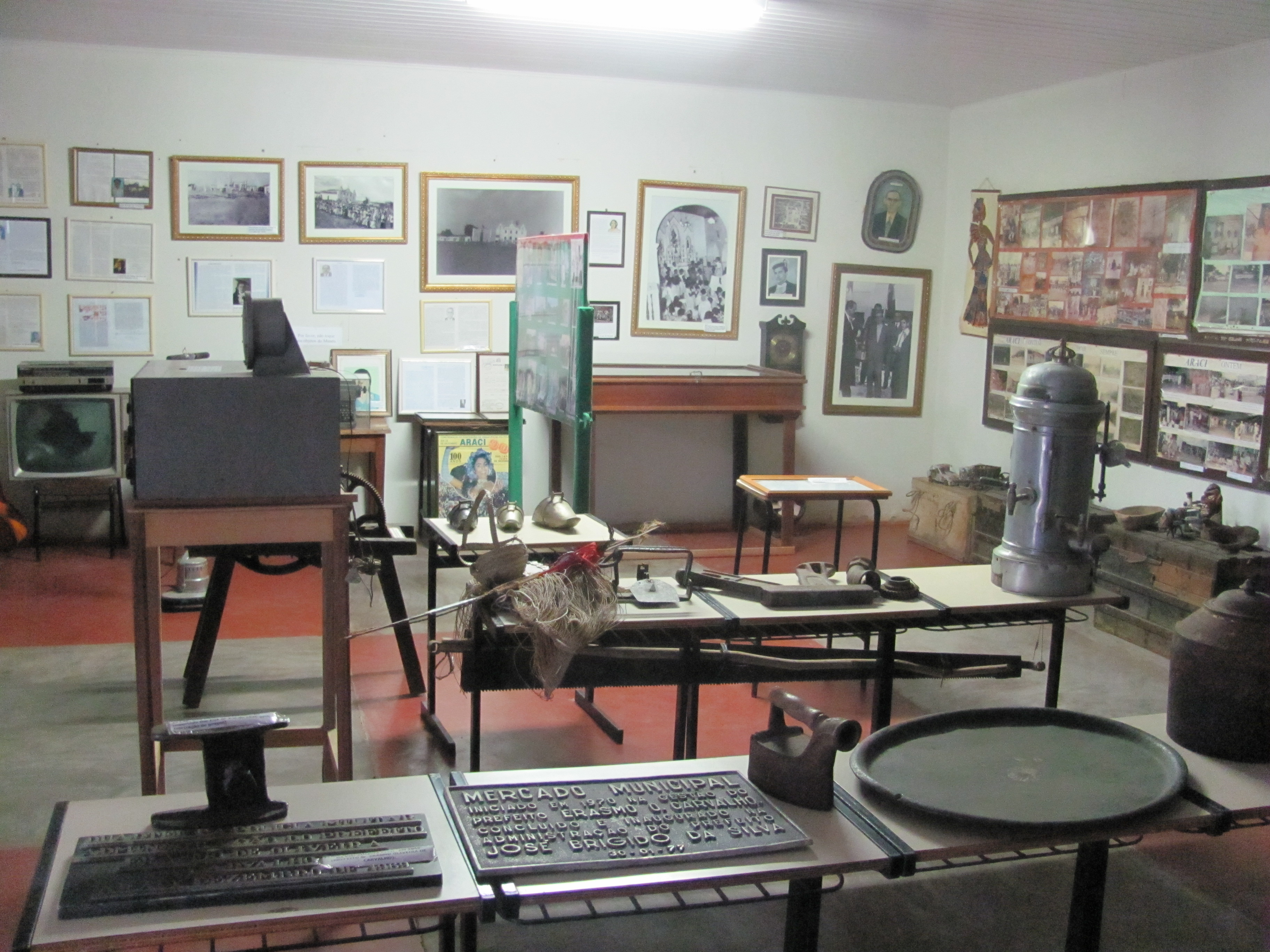 Foto do Centro Cultural da Cidade de Araci da Bahia